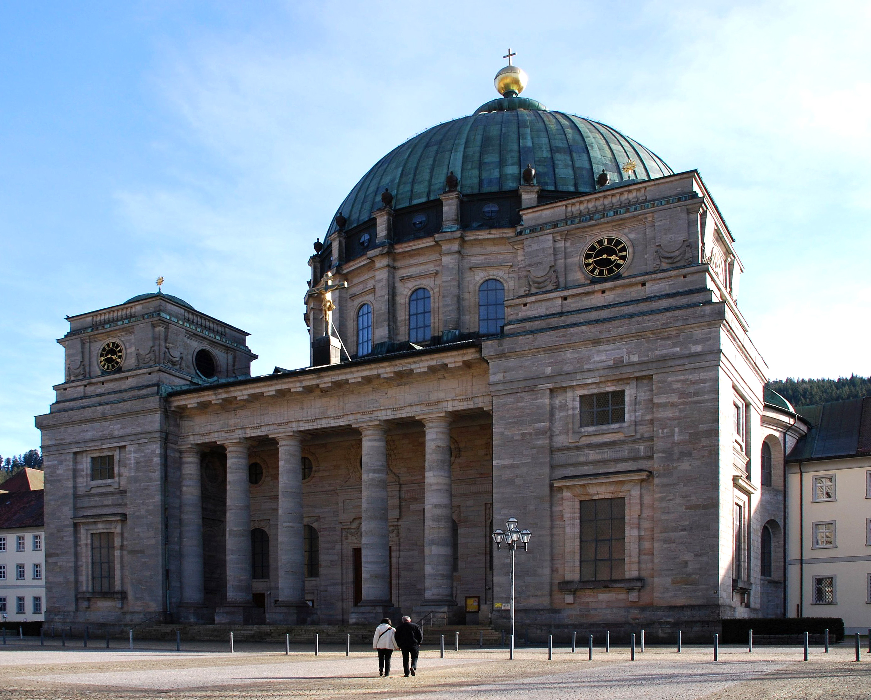 Dom St. Blasien